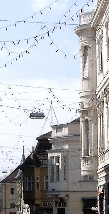 Sarokerkélyek Győrött a Baross út-Kisfaludy utca sarkán (Győr-Moson-Sopron megye)